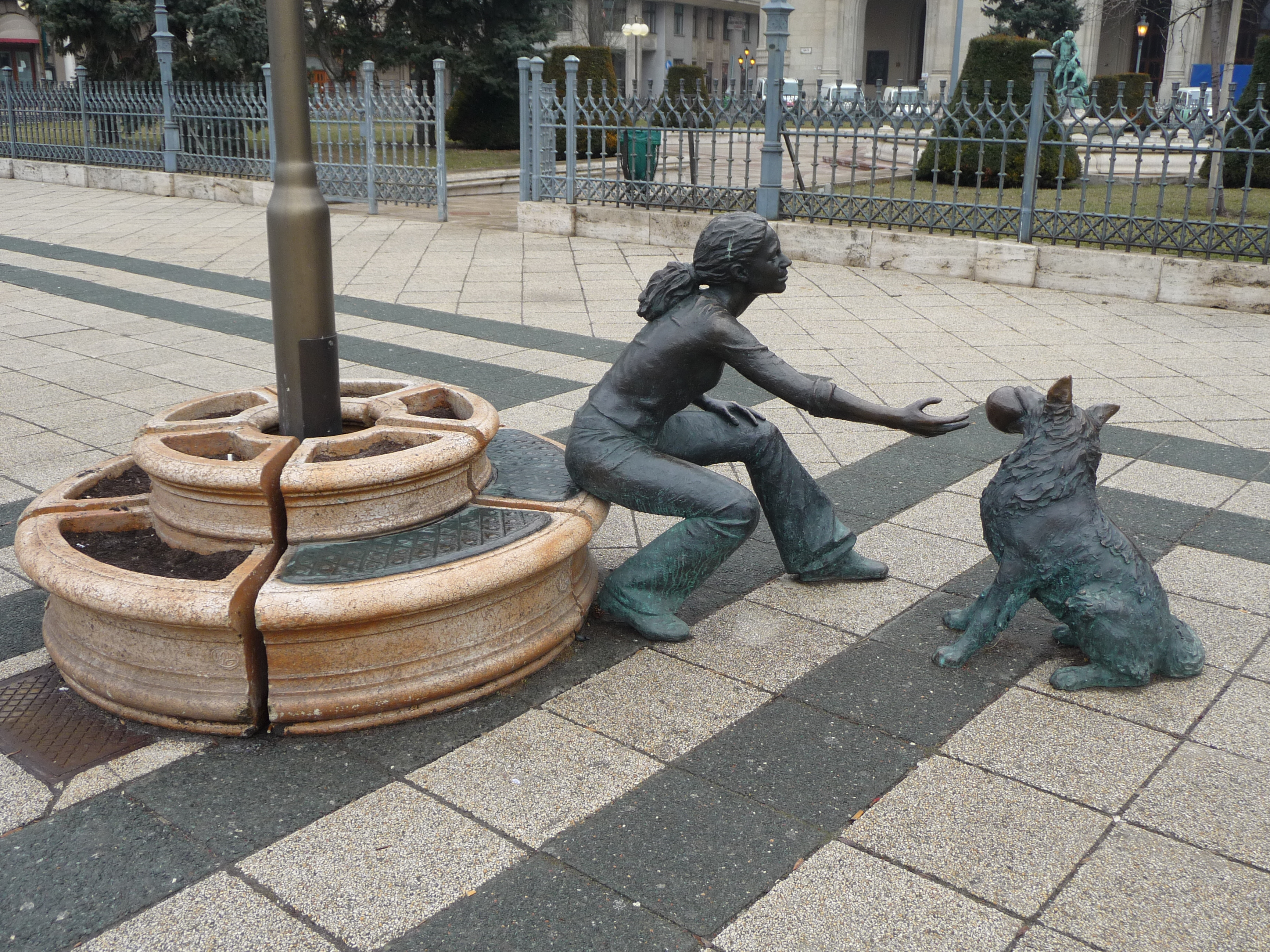 Raffay Dávid: Kutyás lány (bronz, 2007), Vigadó tér, Budapest